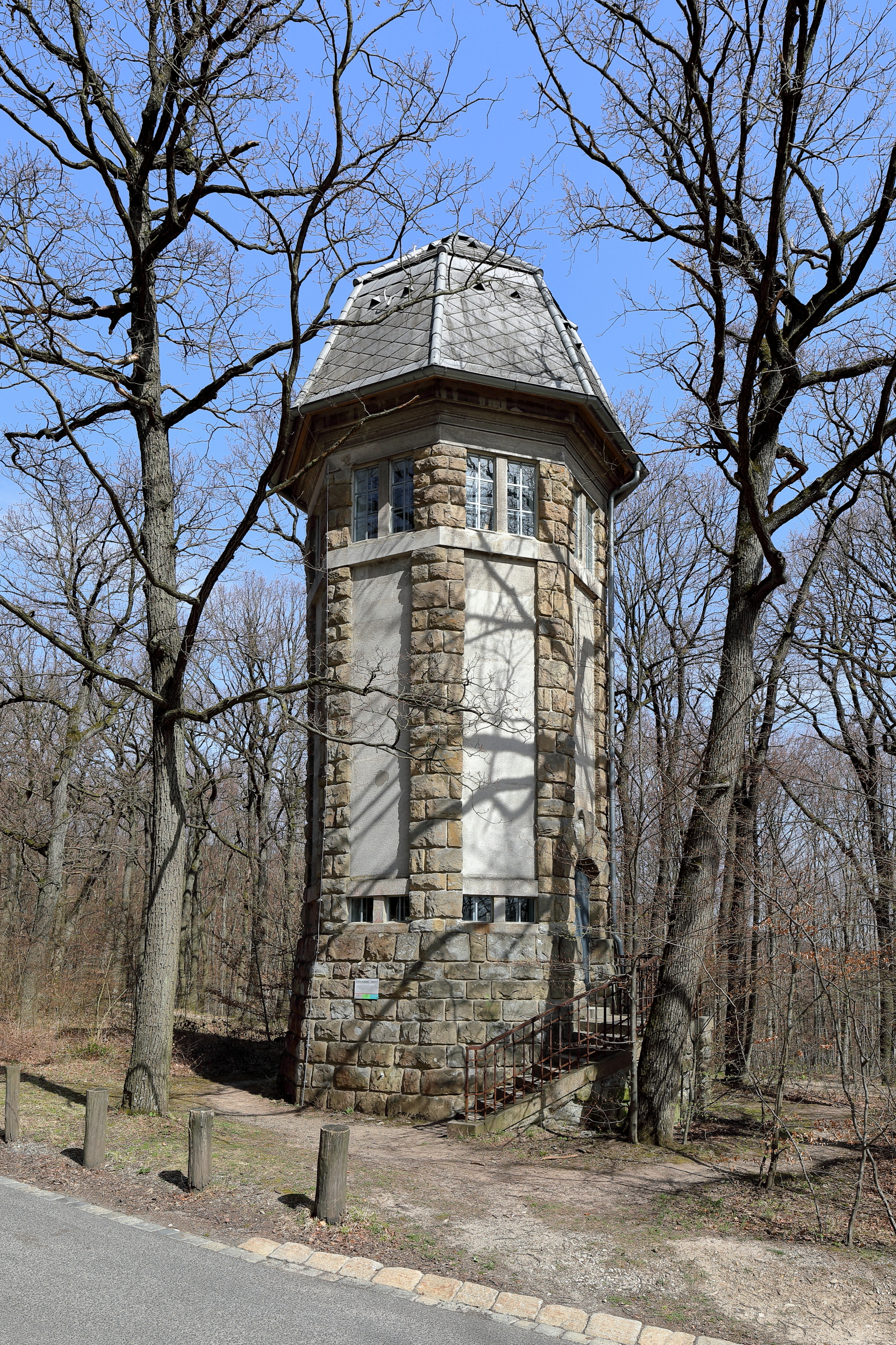 Die Otto-Koenig-Warte im 16. Wiener Gemeindebezirk OttakringDie Otto-Koenig-Warte ist ein ehemaliger Wasserturm, der 1925 vom Wiener Stadtbauamt errichtet wurde. Der achteckige Turm im Zweckbau-Heimatstil wurde zur Vogelbeobachtungswarte umfunktionierten und 2003 nach dem Verhaltensforscher Otto Koenig benannt.